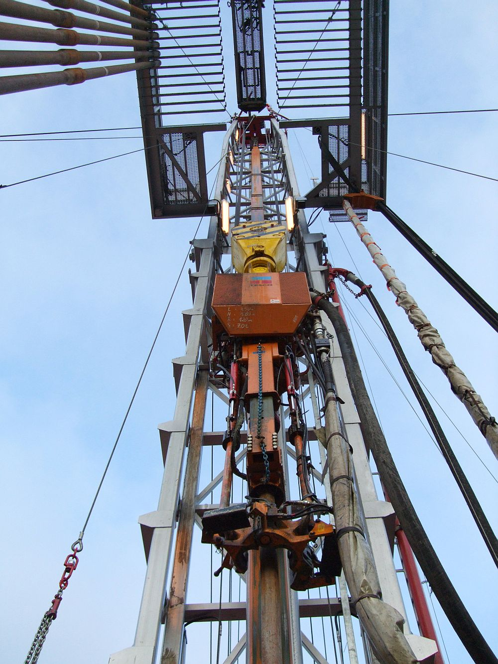 Spülkopf mit Schlauchzuleitung am Bohrgestänge einer Erdöl-Bohranlage